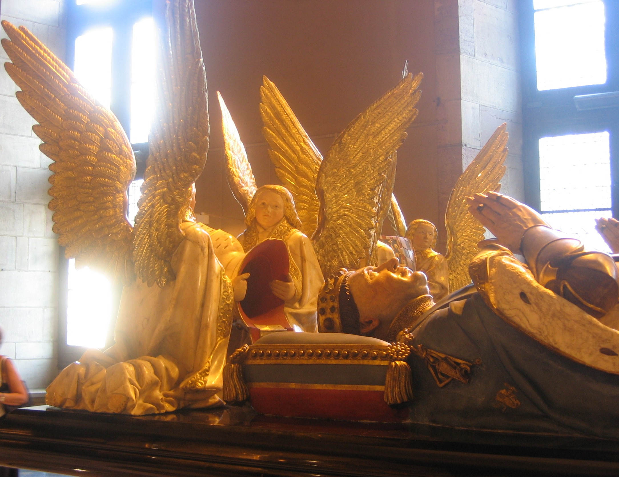 Dijon : musée des Beaux-Arts : tombeau de Jean Sans Peur et Marguerite de Bavière (salle des gardes)